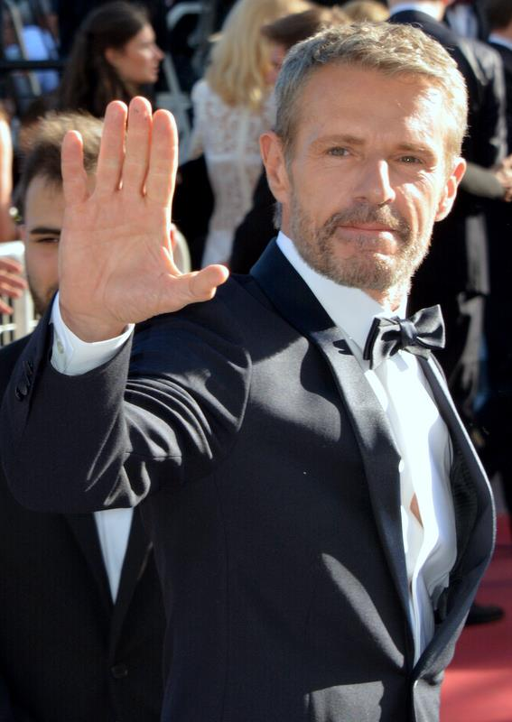 Lambert Wilson au festival de Cannes.